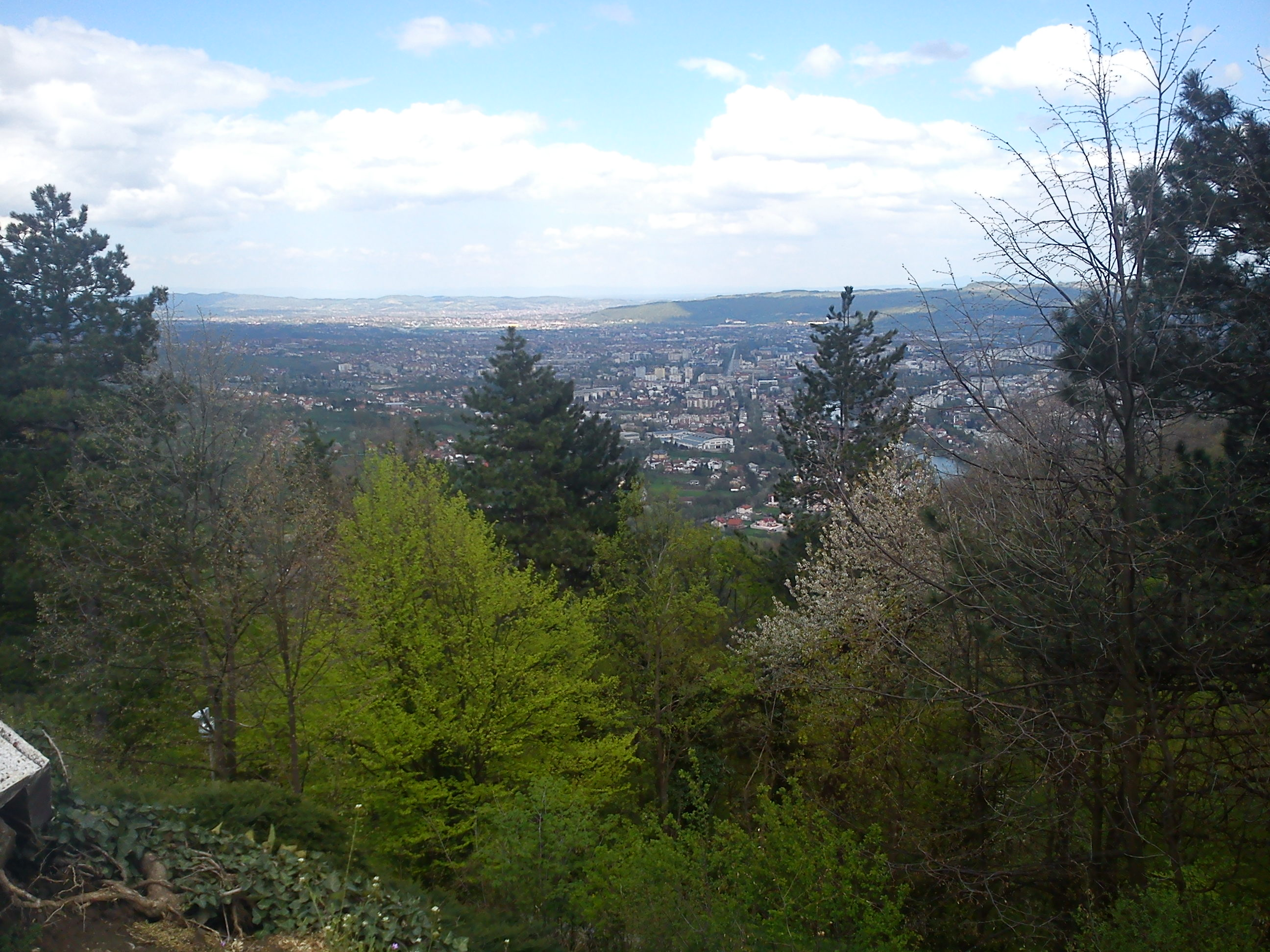 бањалучко излетиште